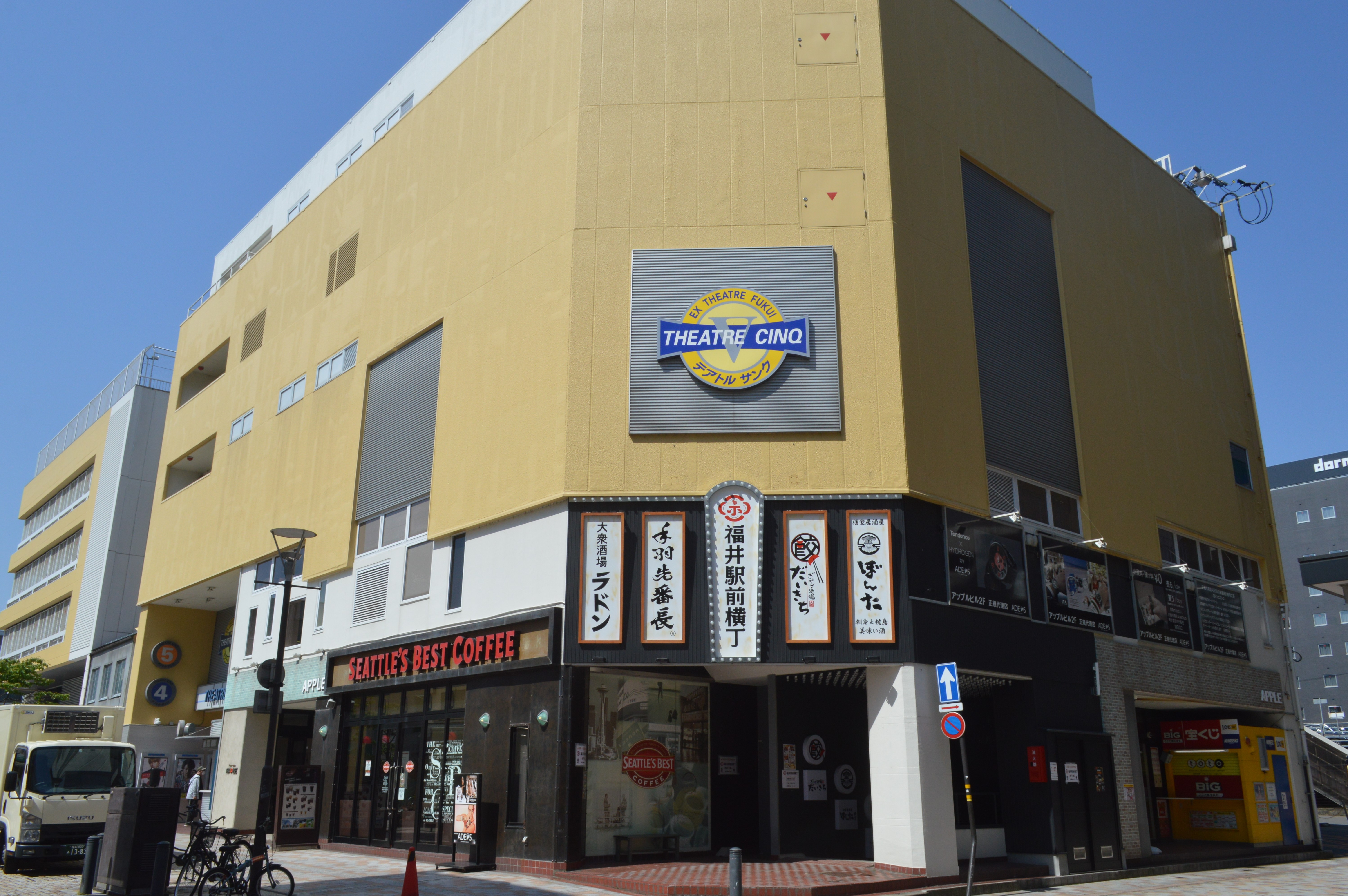 福井県福井市にある映画館「テアトルサンク」。サンクビル。